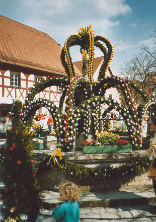 Osterbrunnen in Heiligenstadt (Franconia)